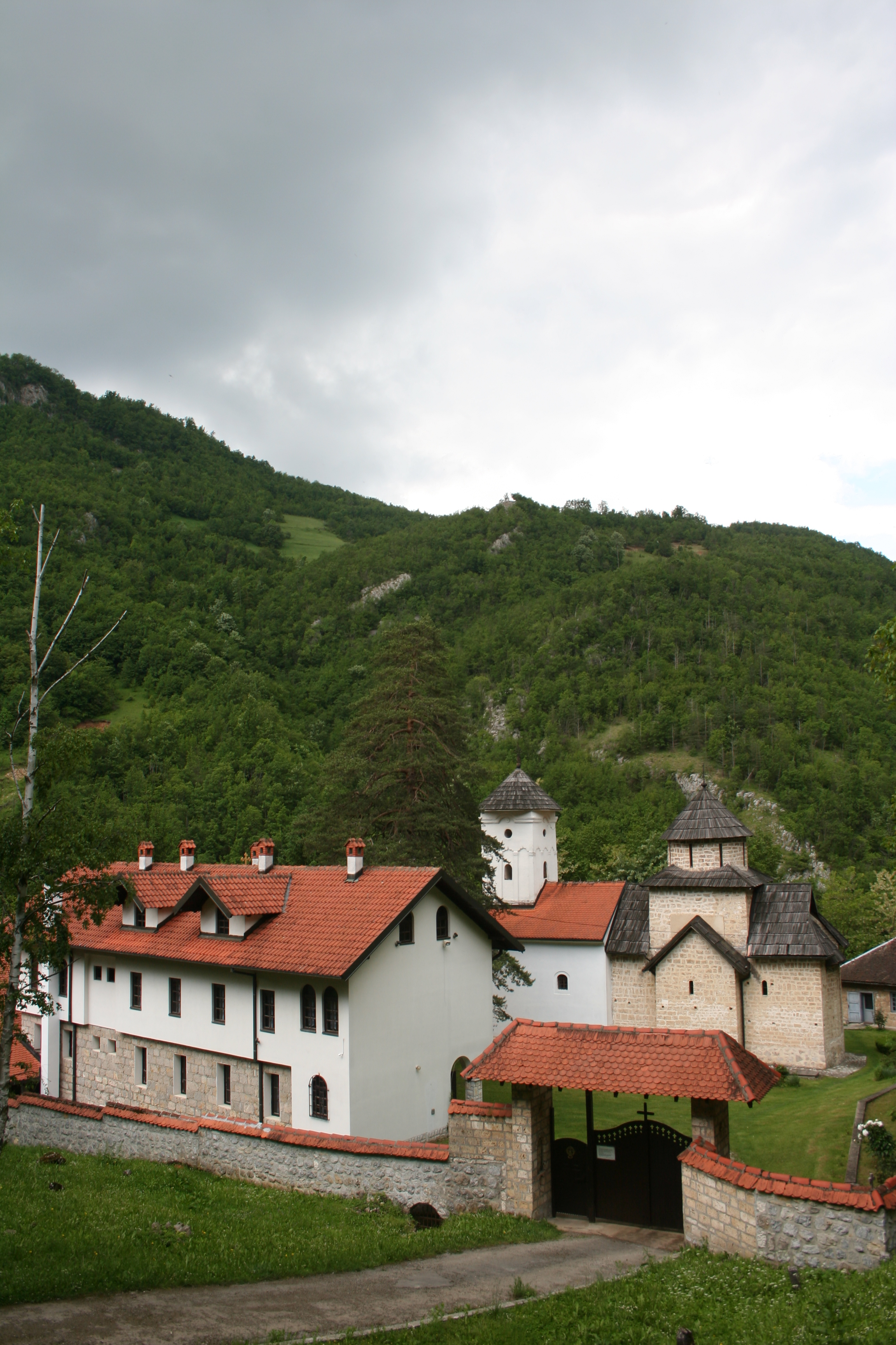 Manastir Pustinja